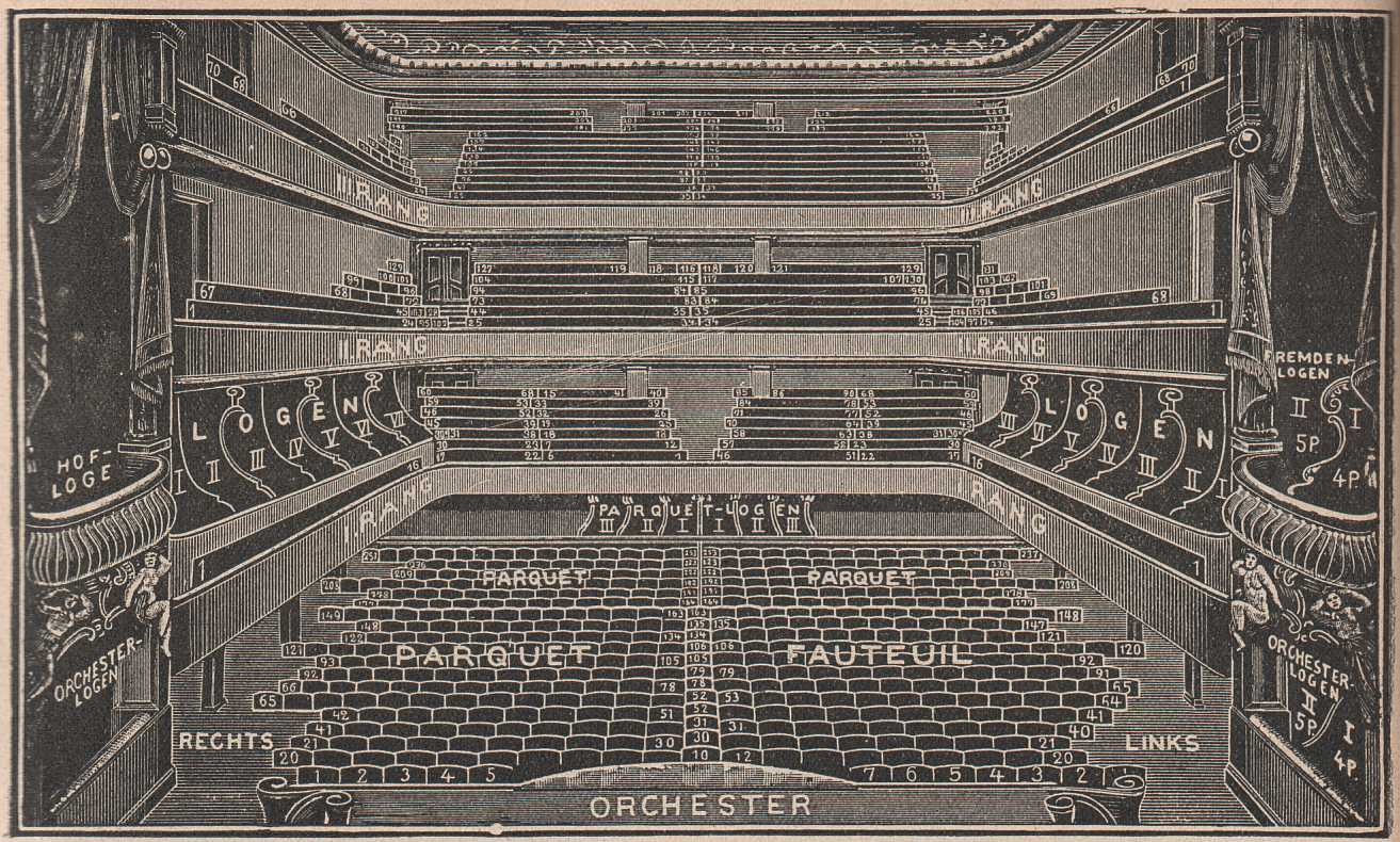 Rudolph Hertzog, Agenda 1912. Jahreskalender des Berliner Kaufhauses. Seite 104. Theater des Westens in Berlin W, Kantstraße. Leinen, 224 Seiten, 19,5 x 28,5 cm